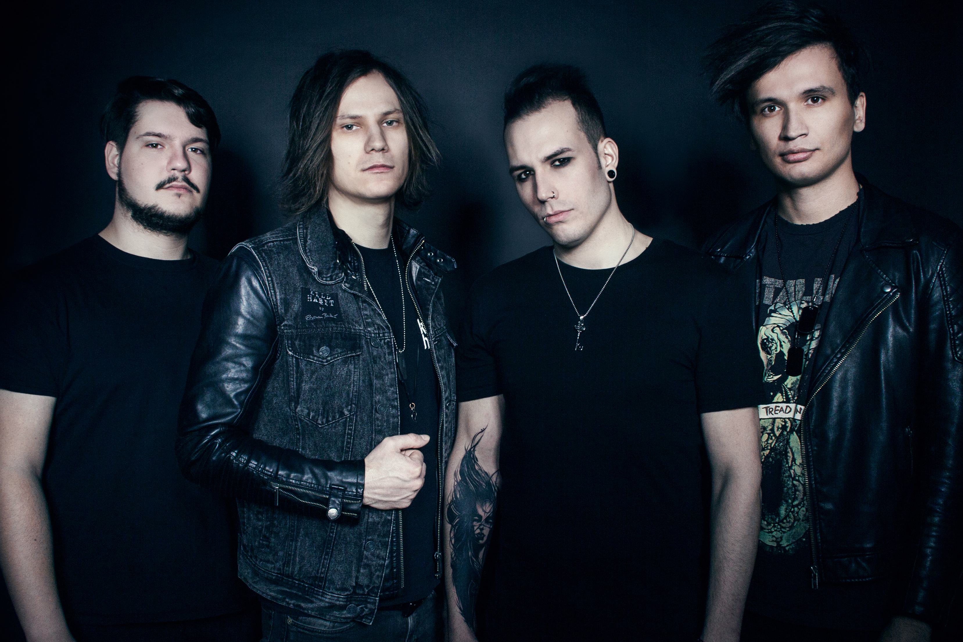 The paranoid v roku 2018